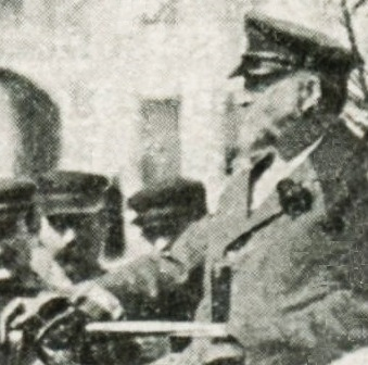 Émile Mors, en 1898 (2e à Bruxelles-Spa) - La Vie au Grand Air du 15 juillet 1898, p.92